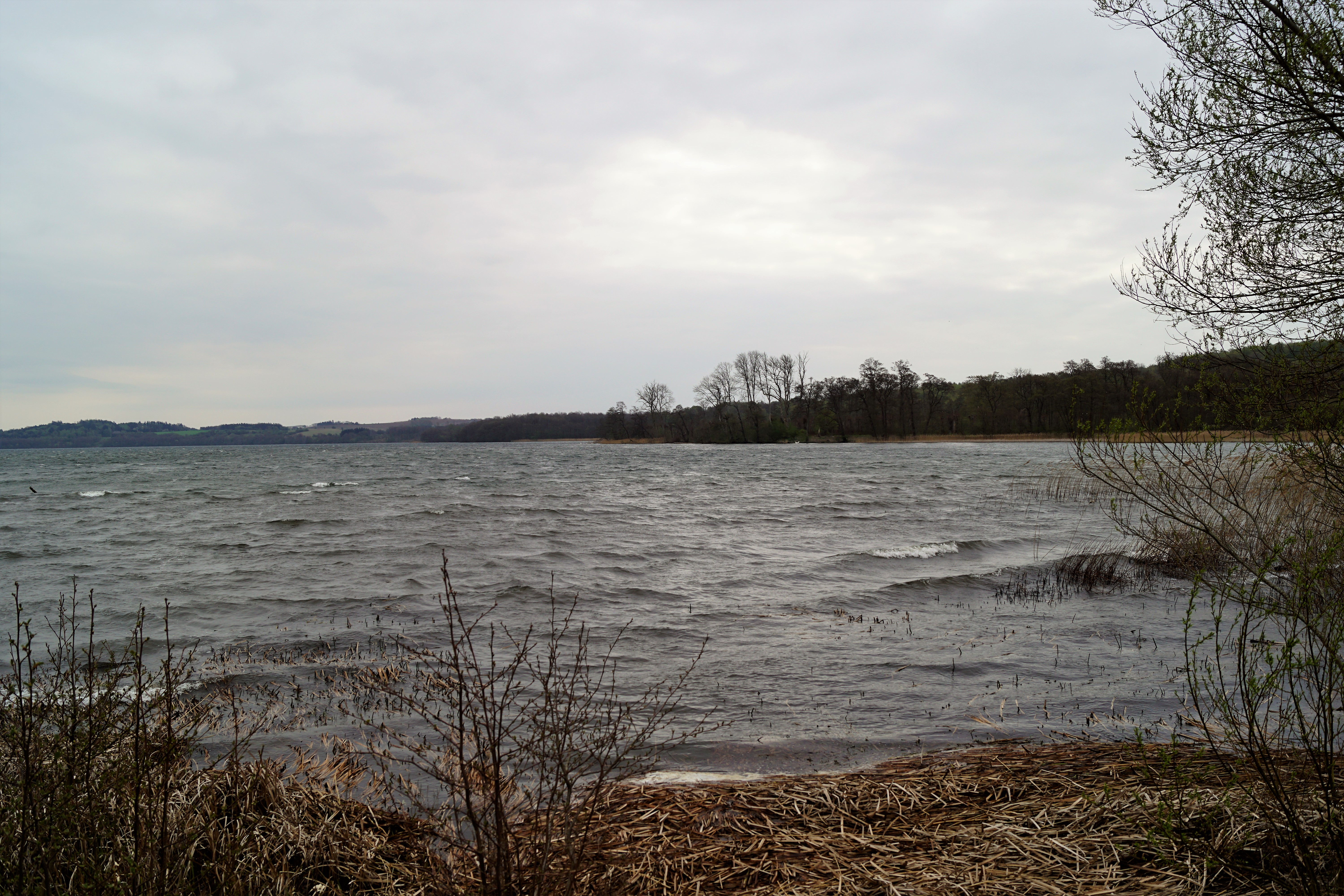 Fussing Sø vest for Randers